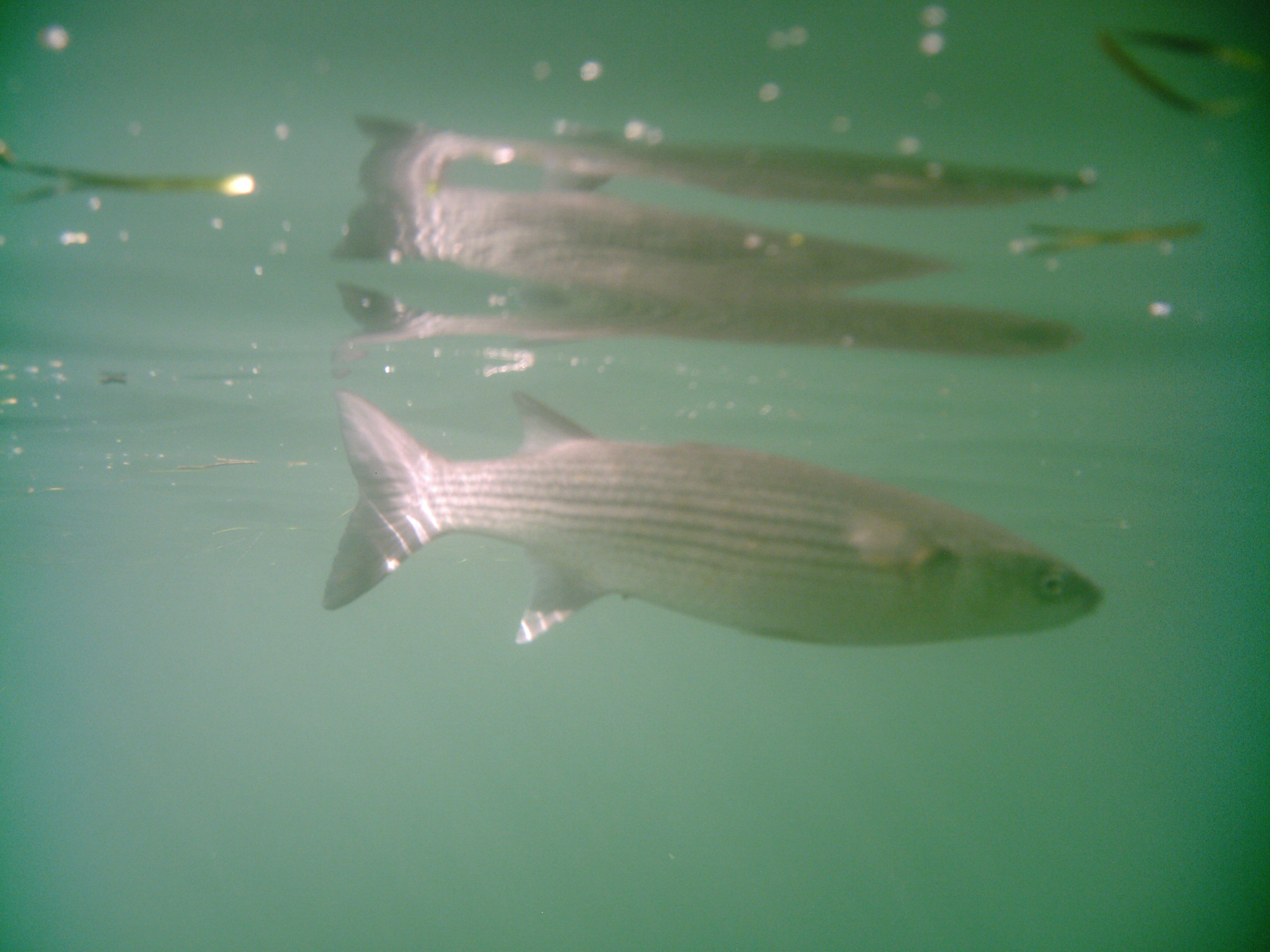 Muxe, munxe ou muxo